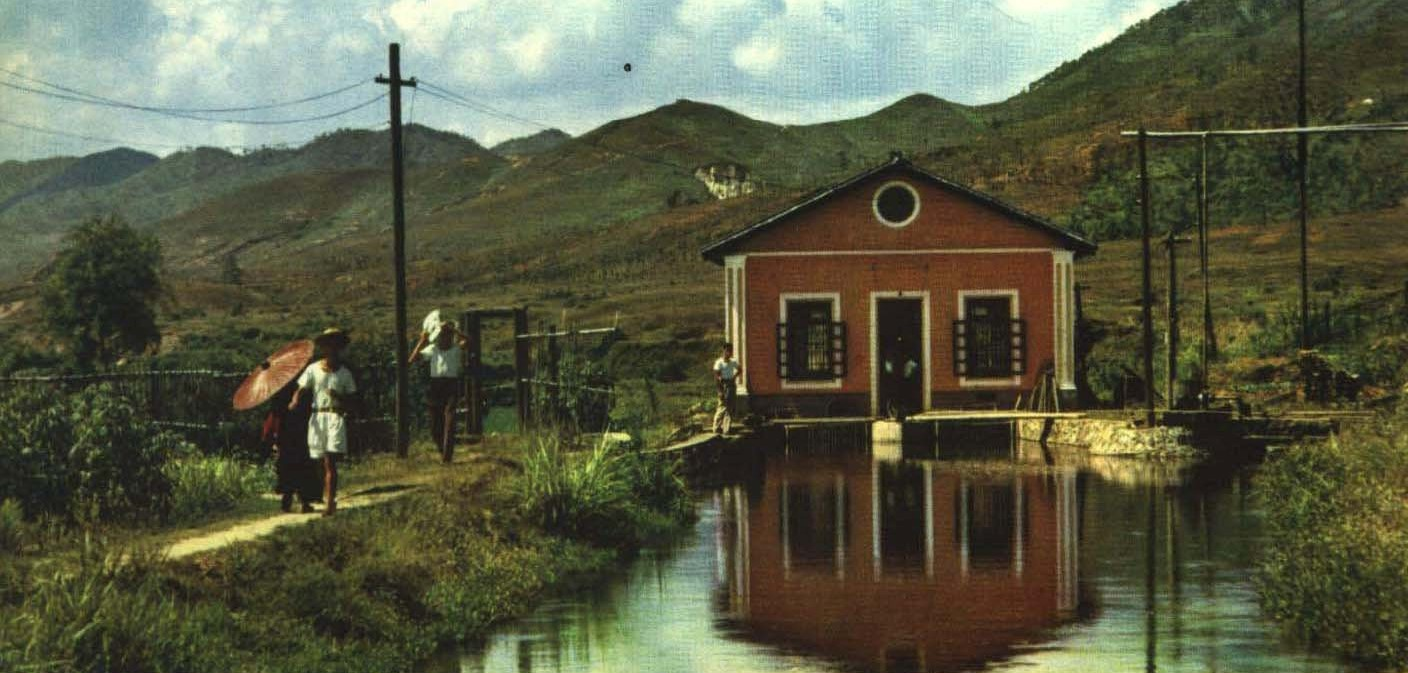 1963-09 1963年 蕉岭水电站